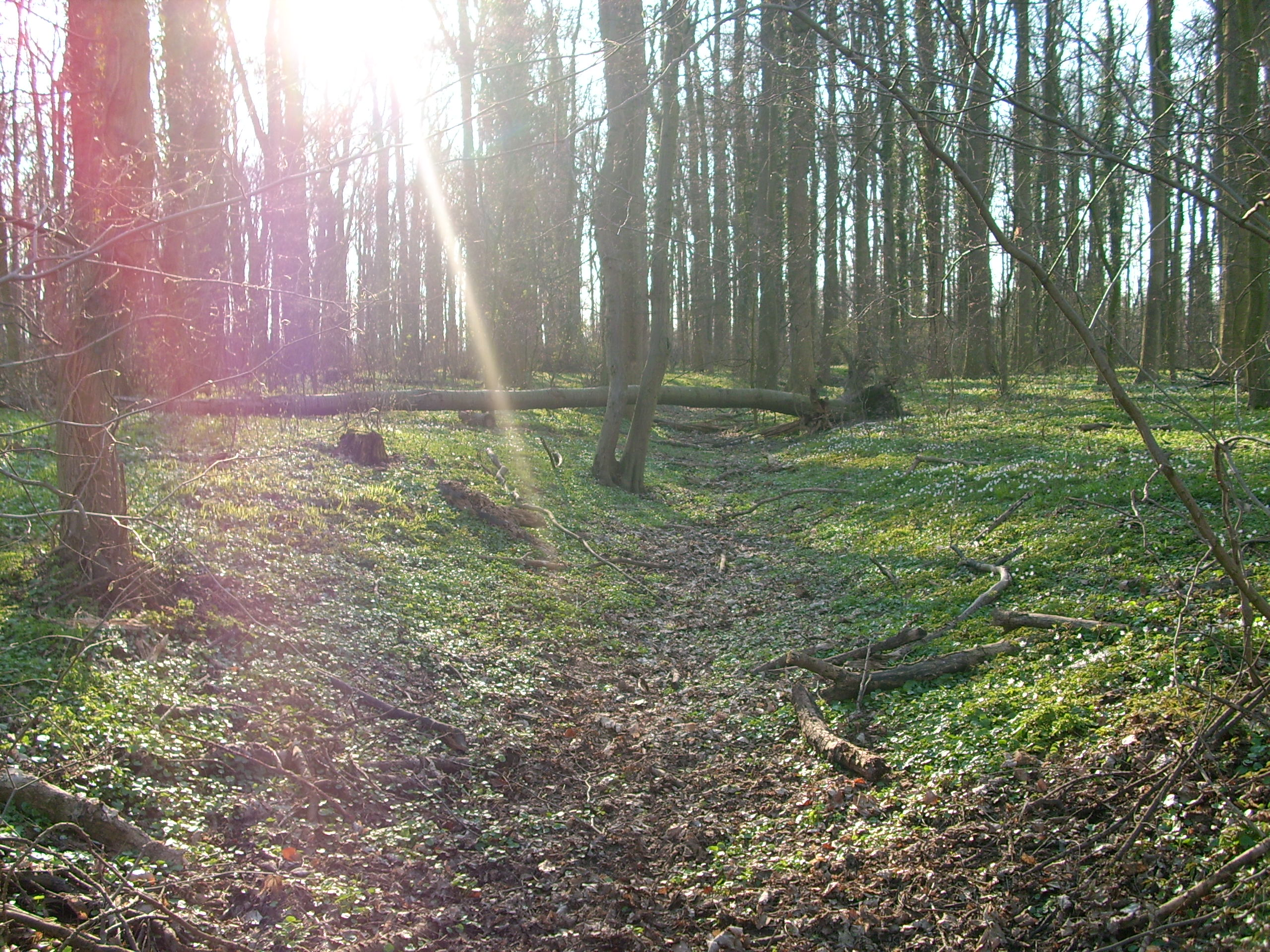 Stockhauser Buscg